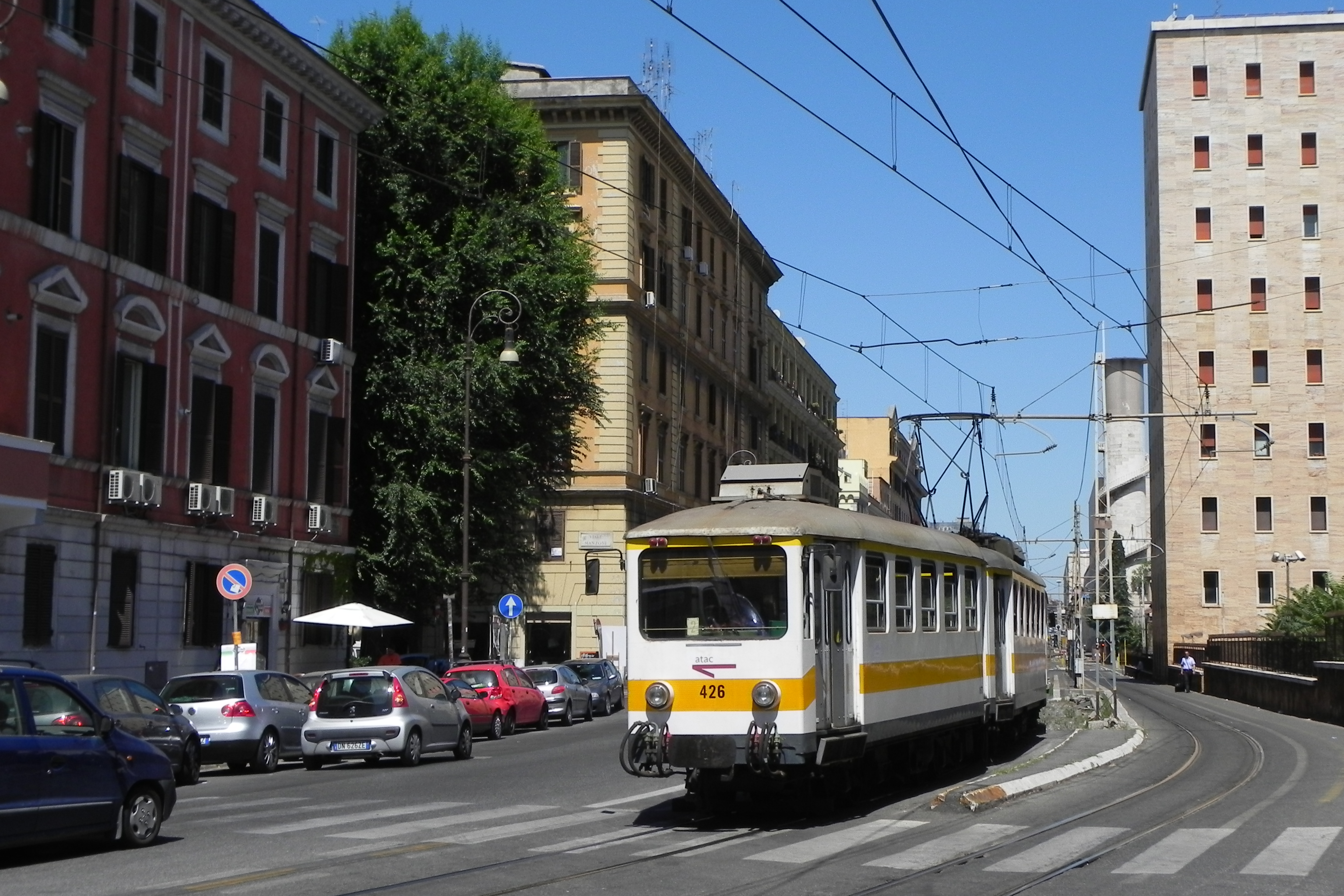 Il convoglio 426 in via Giolitti, Roma.